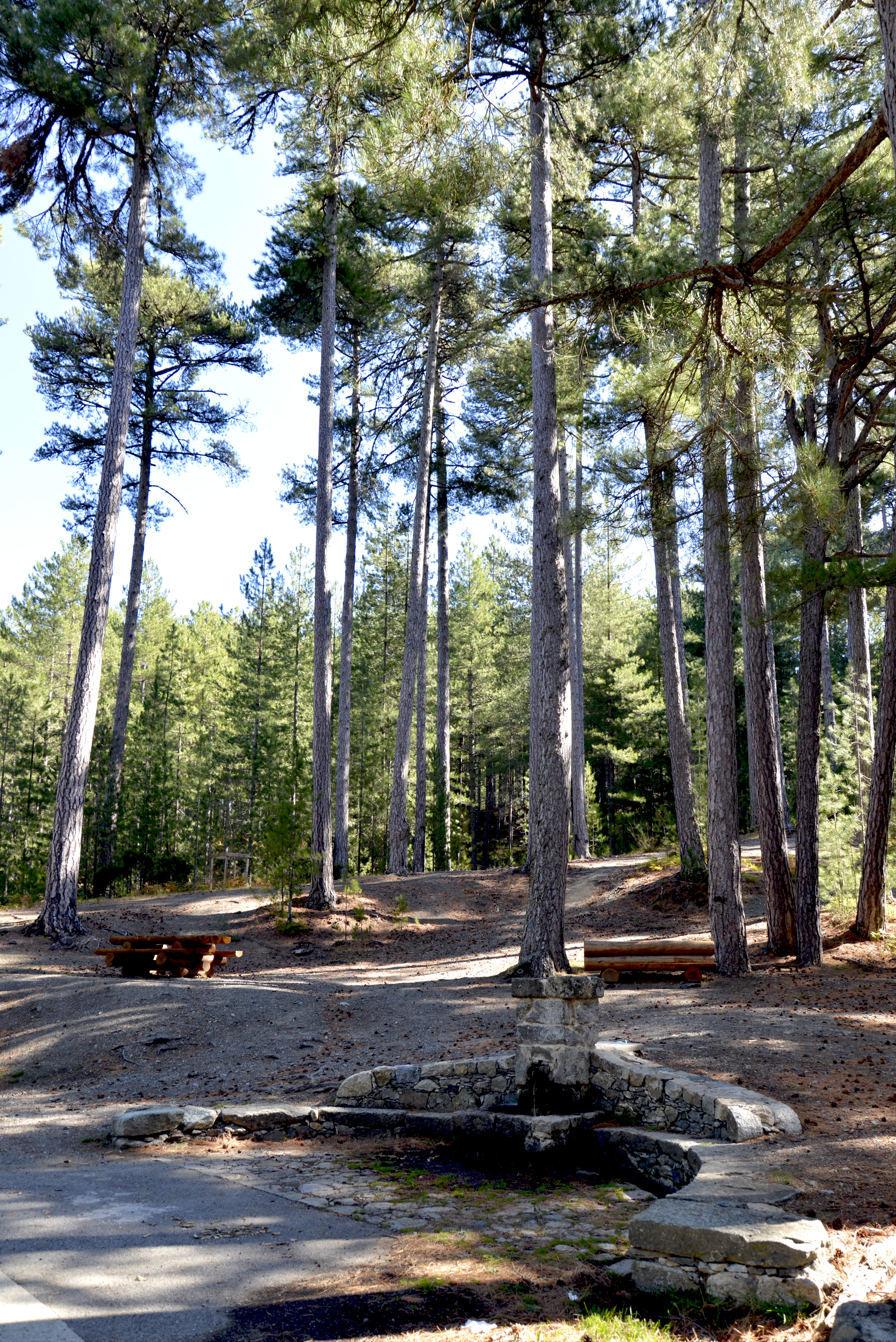 Rospigliani, Centre Corse (Haute-Corse)- La fontaine de Padule dans la forêt du même nom. Le début de piste est celui qui conduit à Campo Rosso, l'ancien terrain de football de Vezzani.